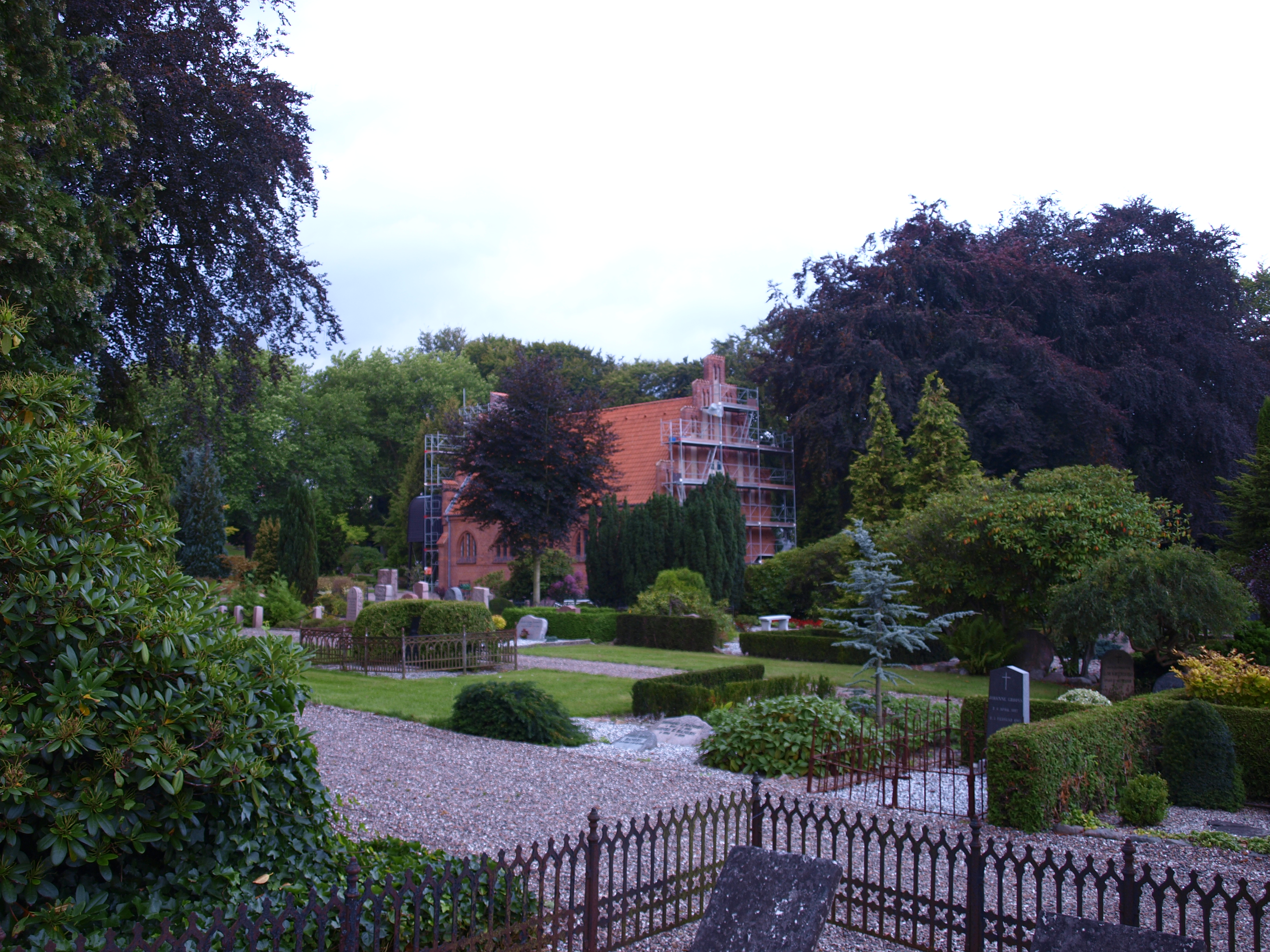 Kolding Gamle Kirkegård, set mod kapellet